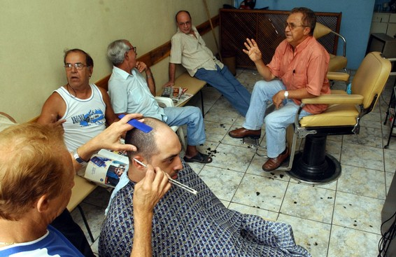 Belo Horizonte (MG) - Moradores do Bairro São Geraldo discutem na barbearia os rumos que o país poderá tomar após o segundo turno das eleições. Foto: Fabio Pozzebom/ABr